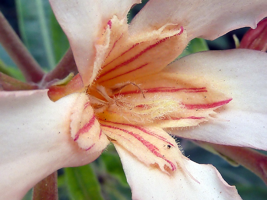 Nerium oleander (Adelfa, Baladre) : Detalle de la corona y de los órganos reproductores - Ornamental/cultivado, calle Compositor Manuel Berná García, Albatera, Alicante (España)